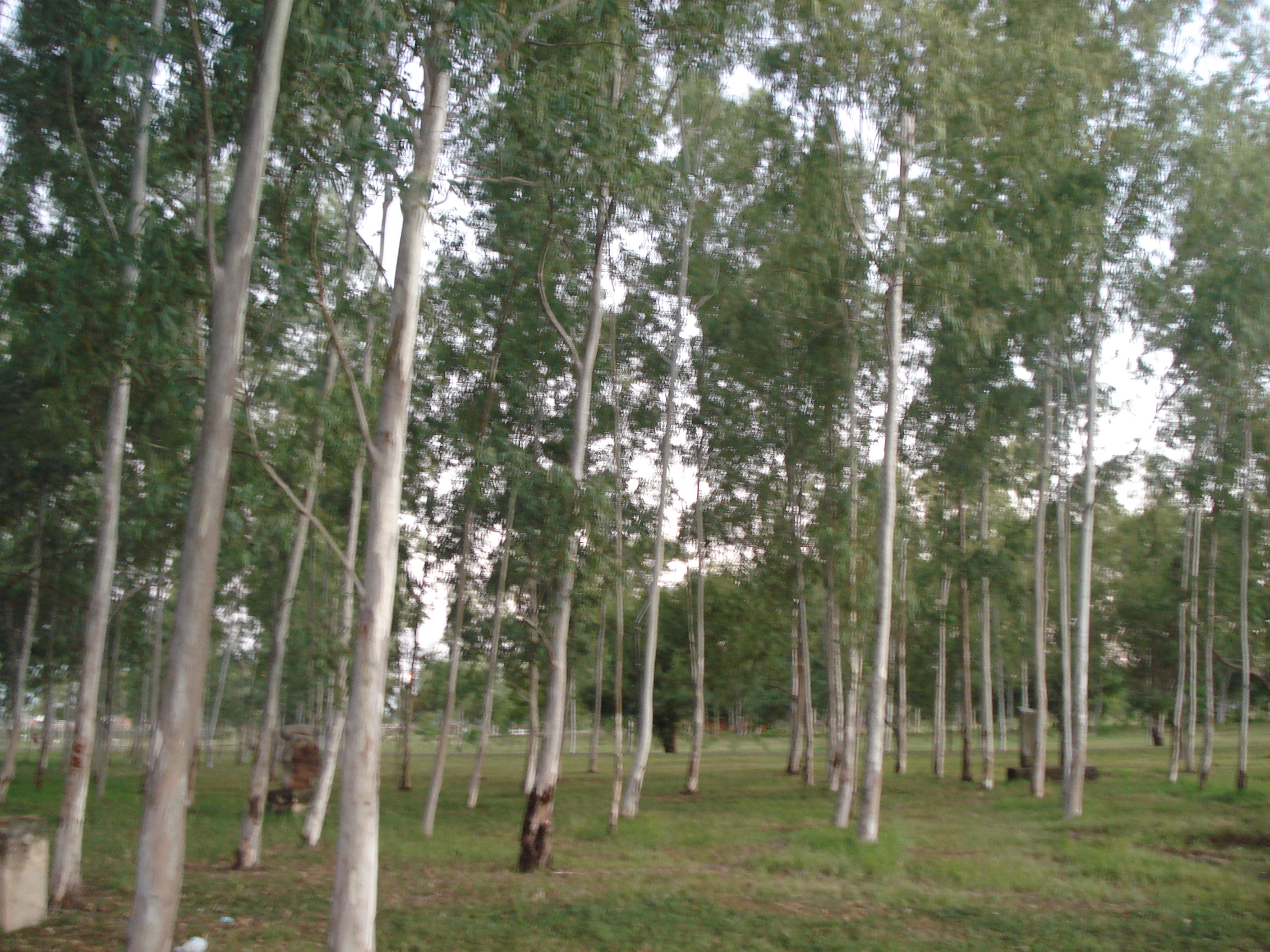 Ñu Guazu eucaliptal